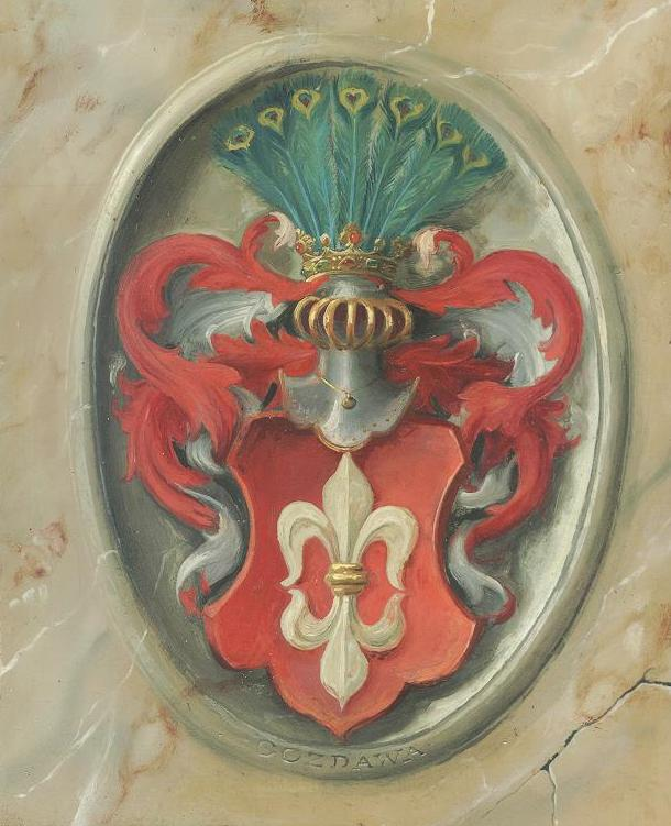 Gozdawa - polski herb szlachecki - polish nobles arms. My own Oil painting. Autor: Tomek Steifer, Gdansk, 2005